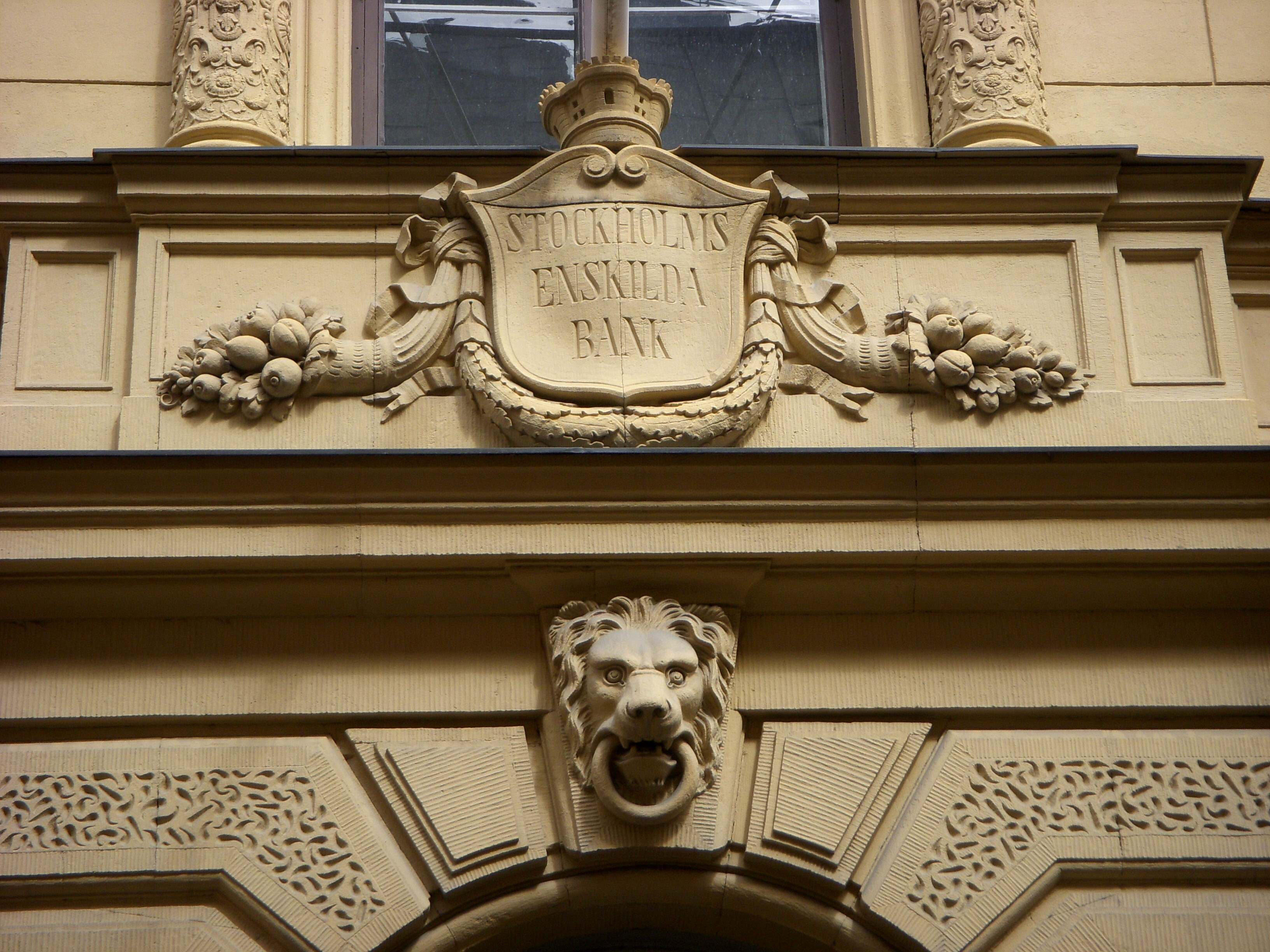 Stockholms Enskilda Bankens byggnad i Gamla stan